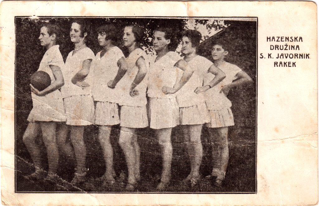 Razglednica Rakeka.